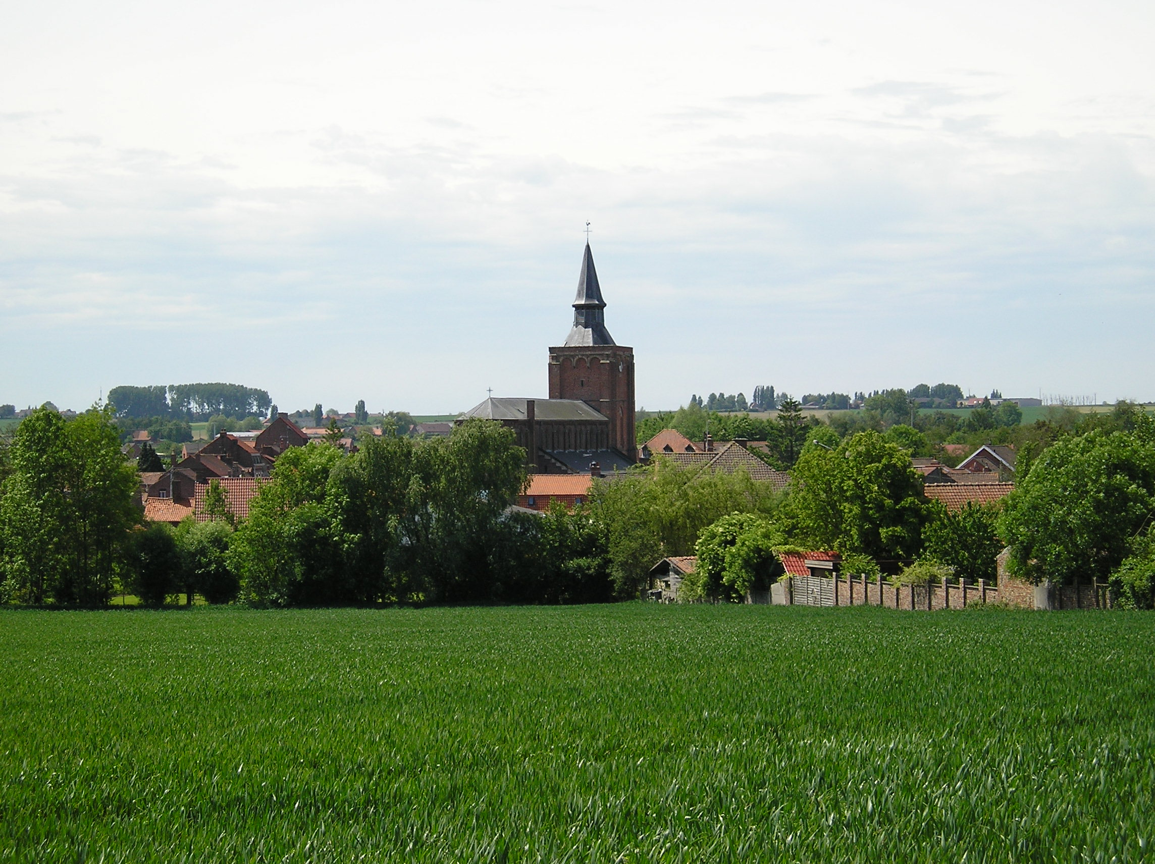 Village de Saint Jans Cappel, près du Mont Noir, en Flandre française